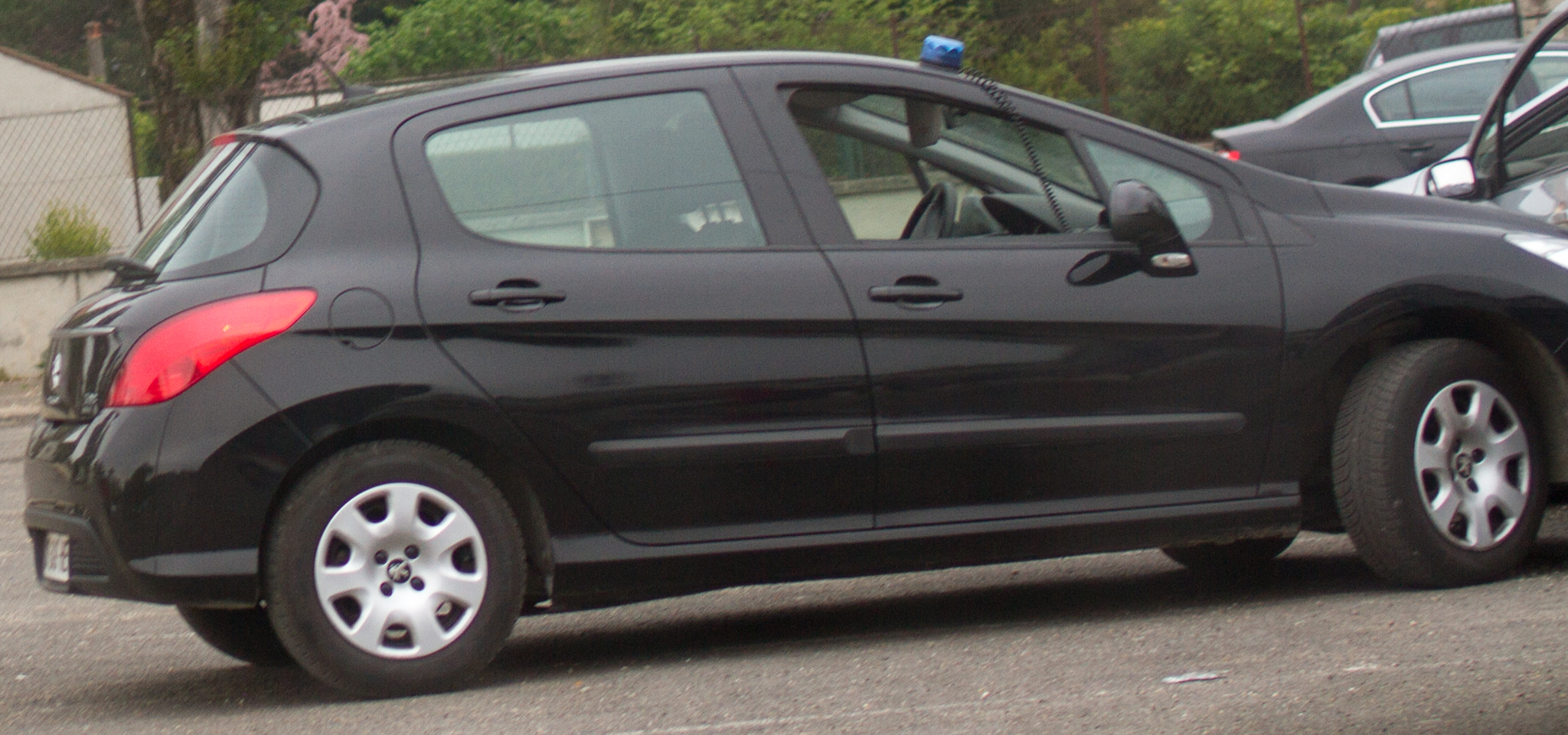 Peugeot 308 - Brigade Anti Criminalité